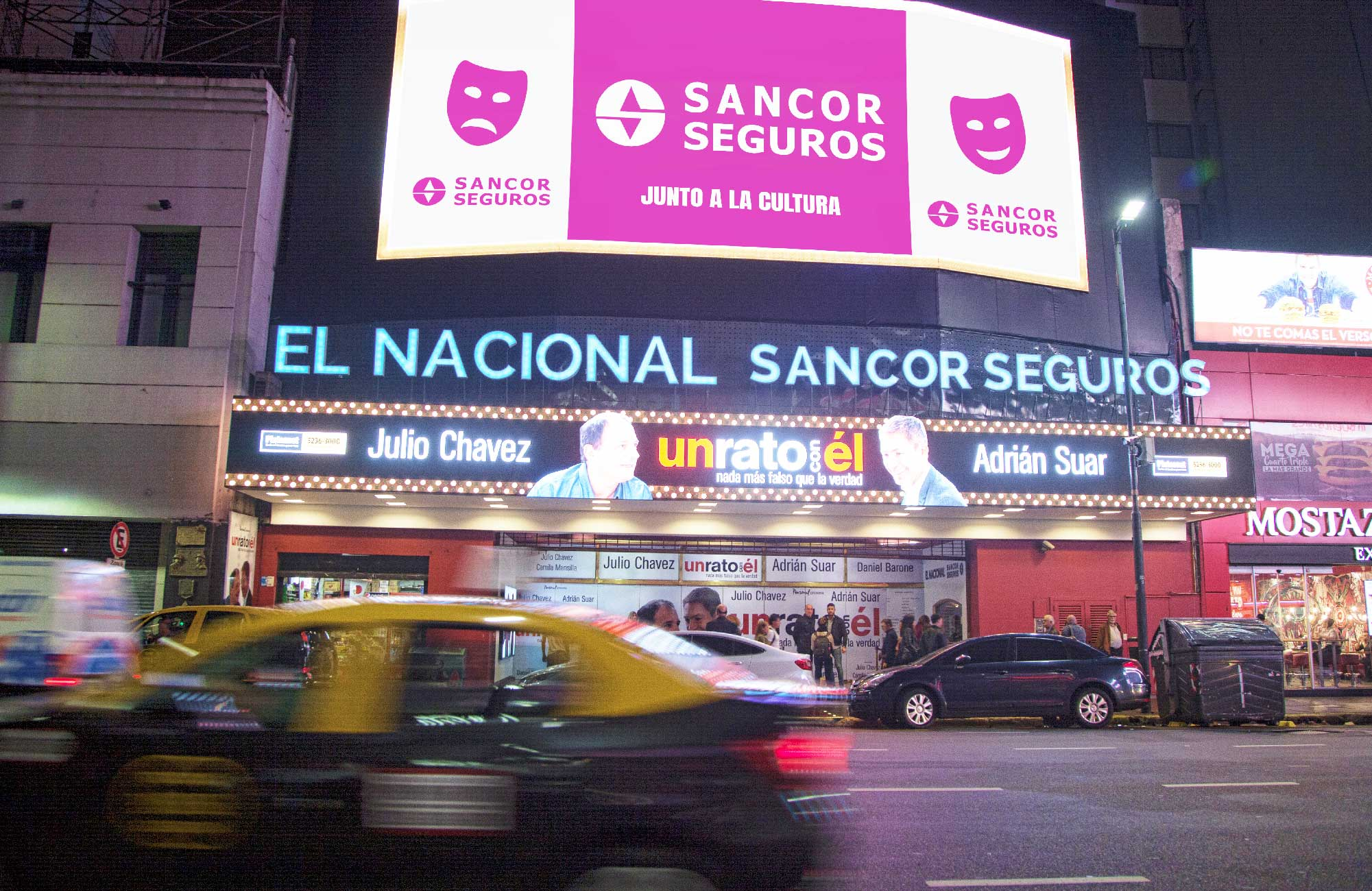 TEATRO EL NACIONAL SANCOR SEGUROS